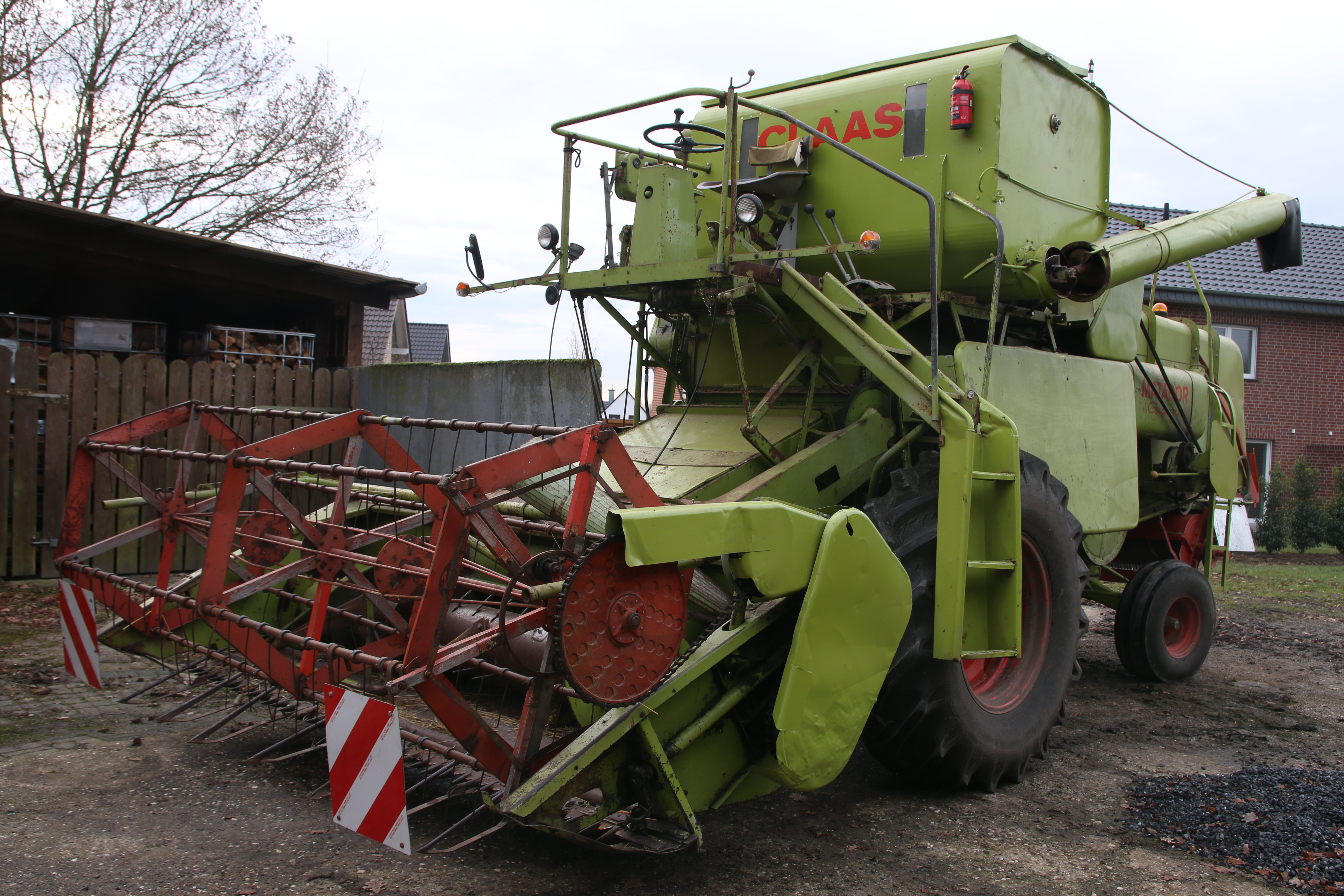 Front eines Matador Gigant